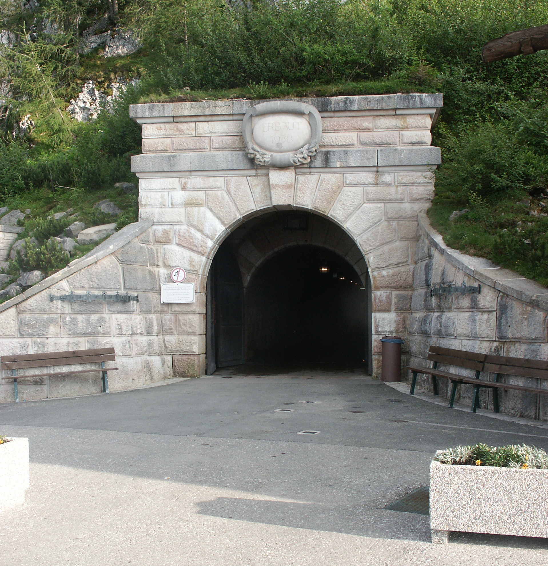 Eingang des Tunnels unterhalb des Kehlsteinhaus